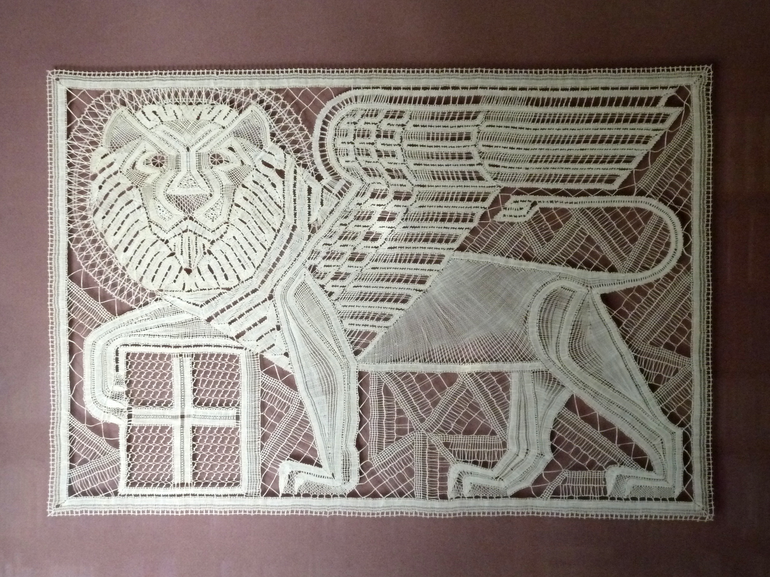 Markuslöwe (385 x 545 mm), Entwurf und Ausführung von Therese Hallinger (1945).